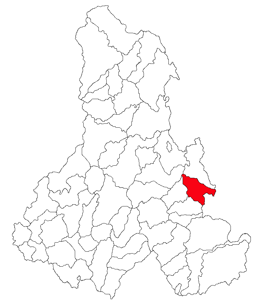 Categorie:Hărţi ale judeţului Harghita Contents 1 Licensing 2 Sursă 3 Licensing 4 Original upload log Licensing Sursă ro::Imagine:Harta_jud_Harghita.png